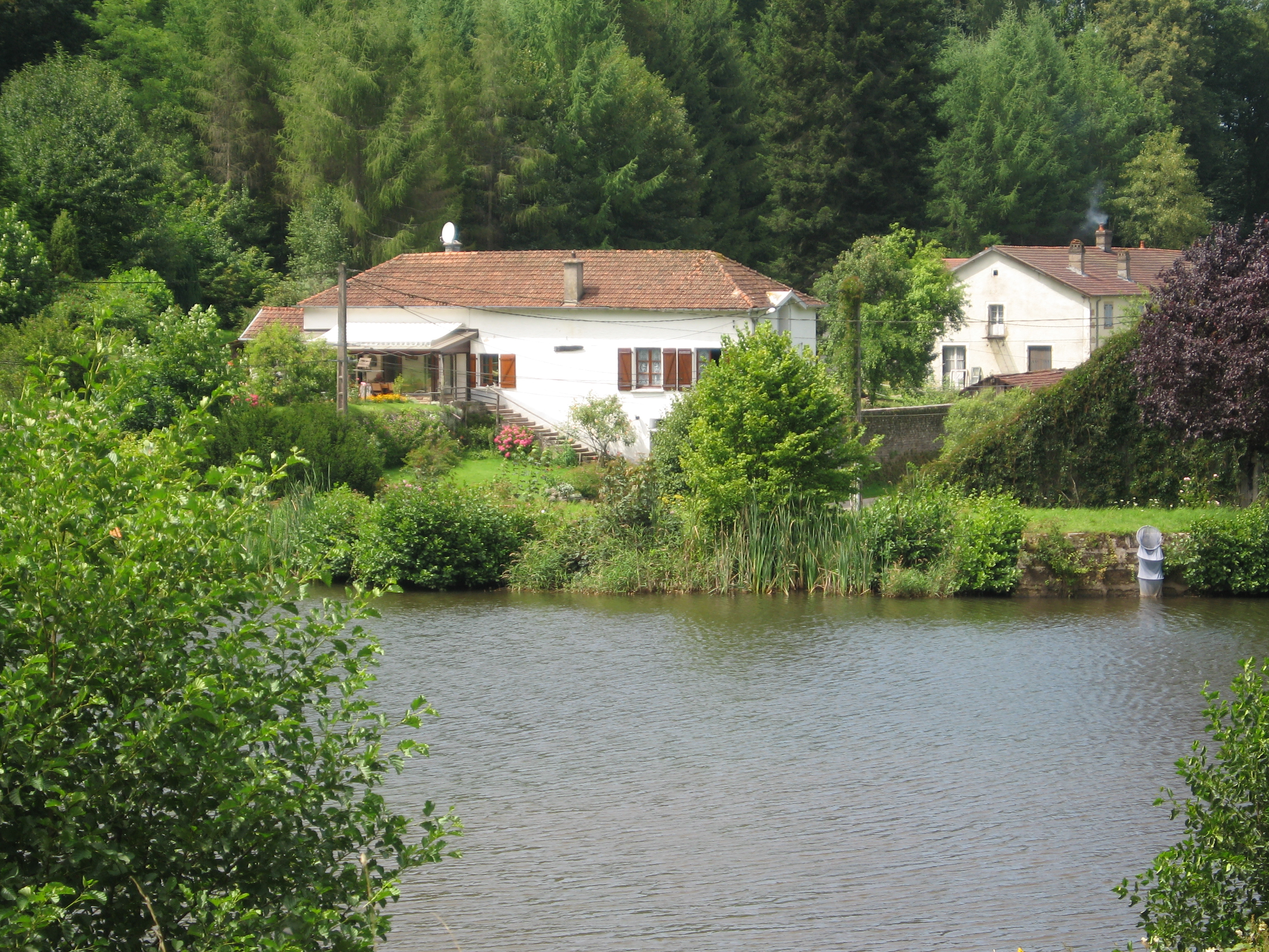 Etang Jolimet